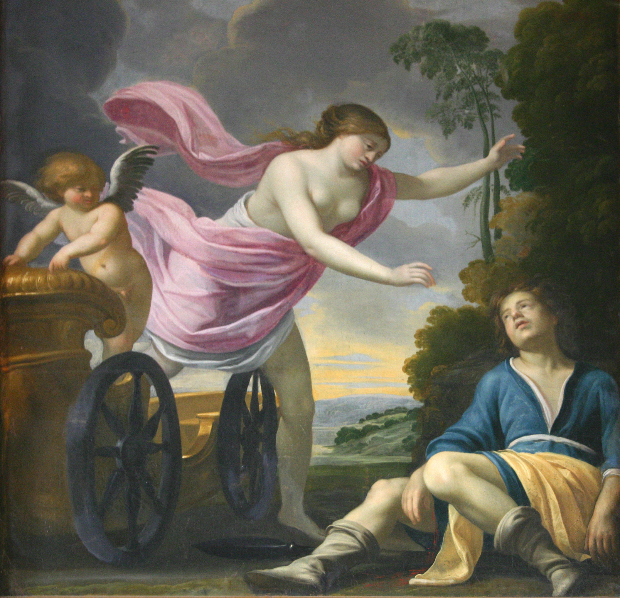 La mort d'Adonis, peinte par Jean Monier, au château de Cheverny